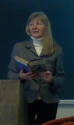 Sirje Tamul loengus.